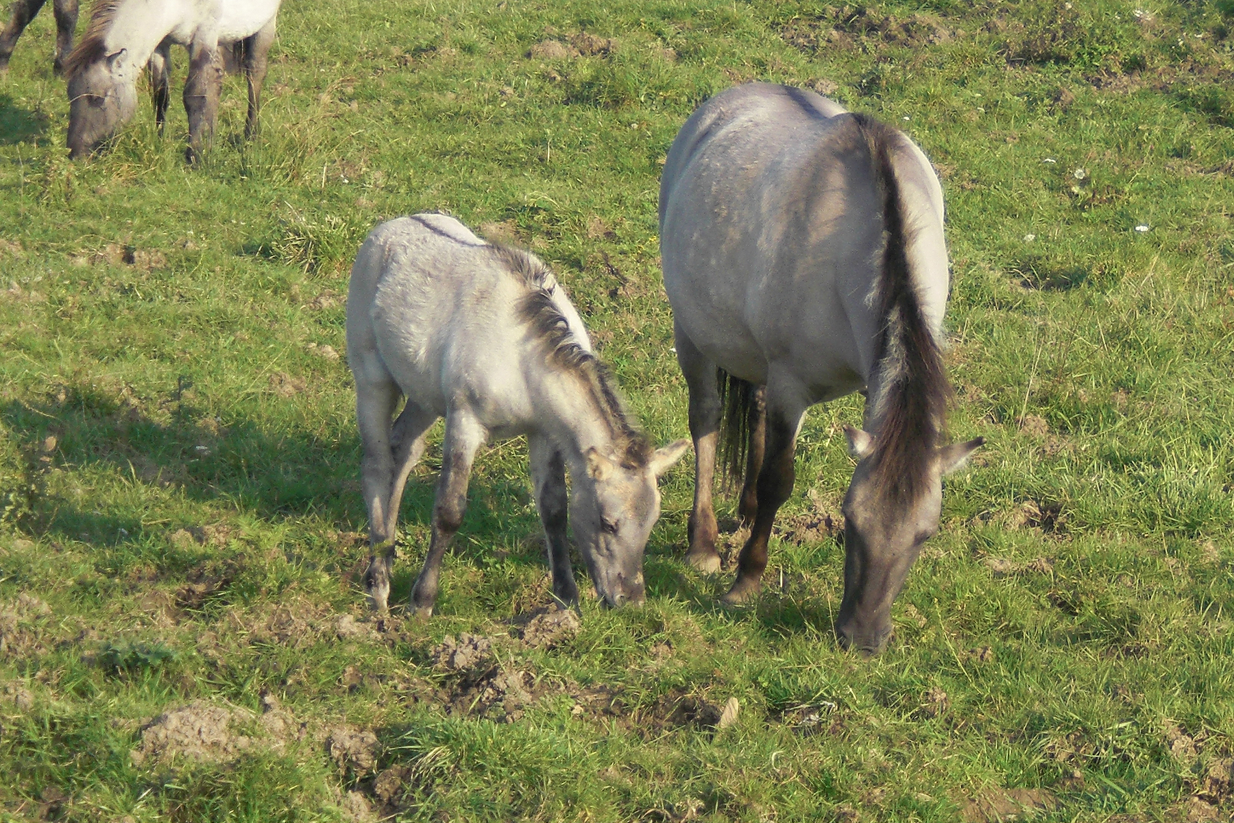 Der Konik ist eine polnische Ponyrasse, die eng mit dem osteuropäischen Wildpferd Tarpan verwandt ist. Seit September 2009 betreibt der NABU Rheinland-Pfalz auf dem ehemaligen militärischen Übungsplatz Schmidtenhöhe das Projekt „Halboffene Weidelandschaft“. Hier werden 130 Hektar Naturschutzflächen von Taurus-Rindern und Koniks beweidet, um die Ausbreitung von Gehölzen zu verhindern und so einen geeigneten Lebensraum für selten gewordene Tier- und Pflanzenarten zu erhalten.